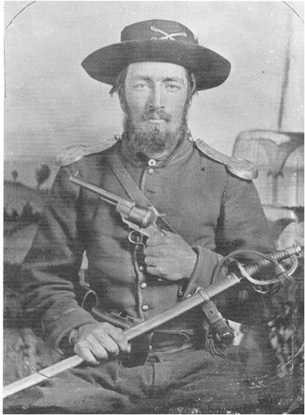 Cavalier de l'union avec un revolver Lefaucheux 12 mm